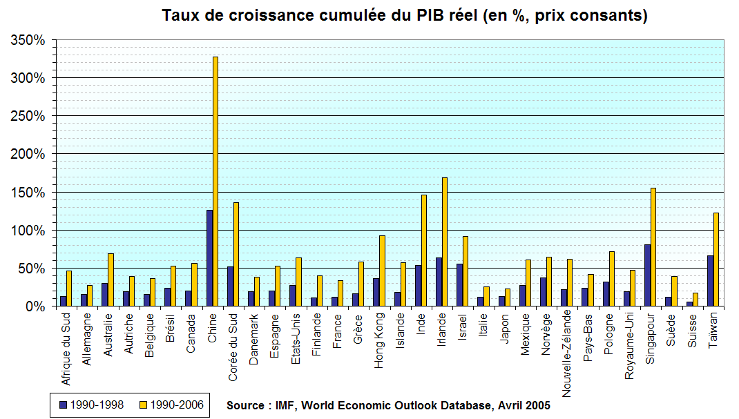 Croissance cumulée du PIB en prix constants, 1990 - 1998 and 1990 - 2006.